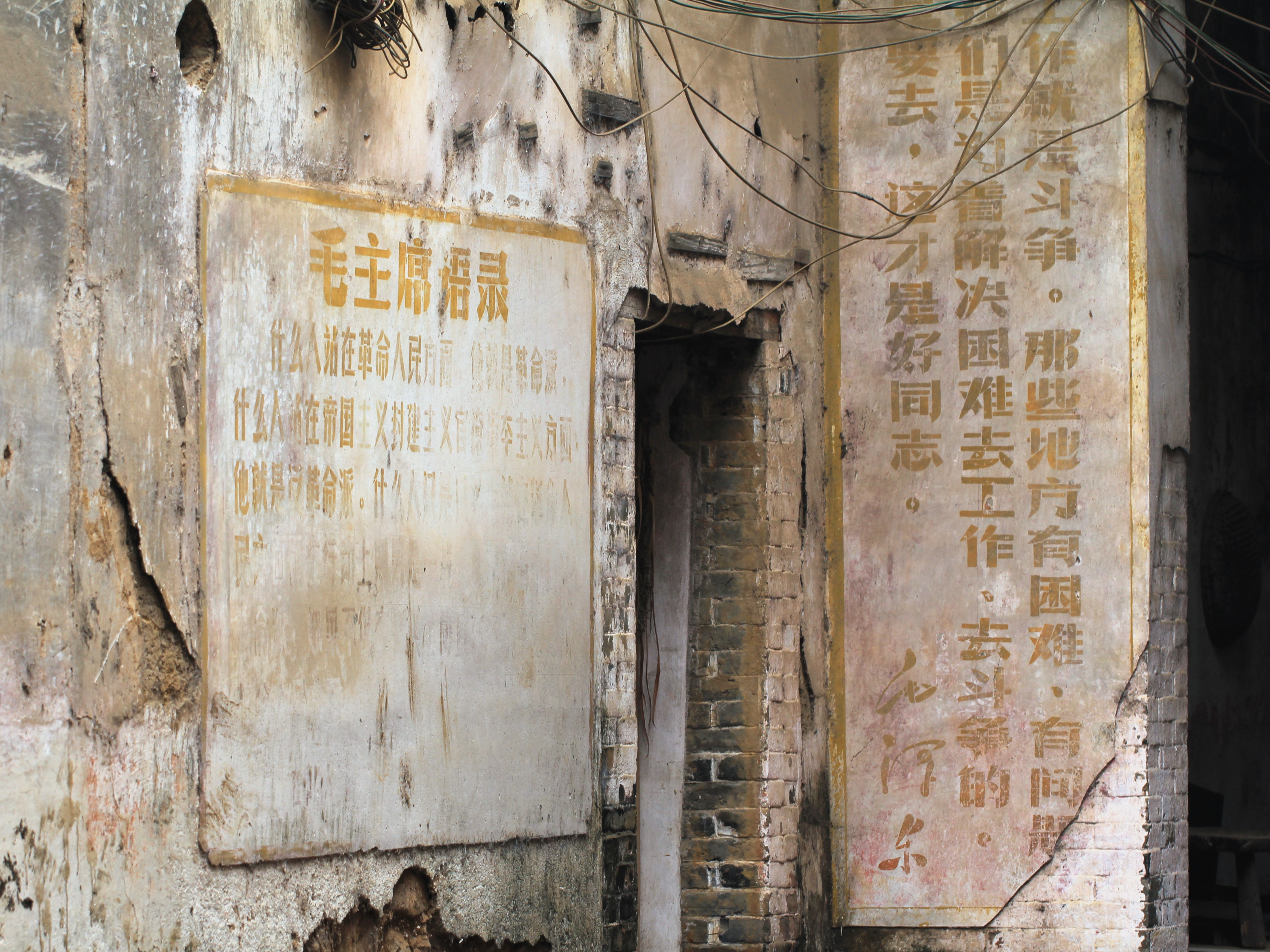 中国广西柳州市武宣县，毛主席语录